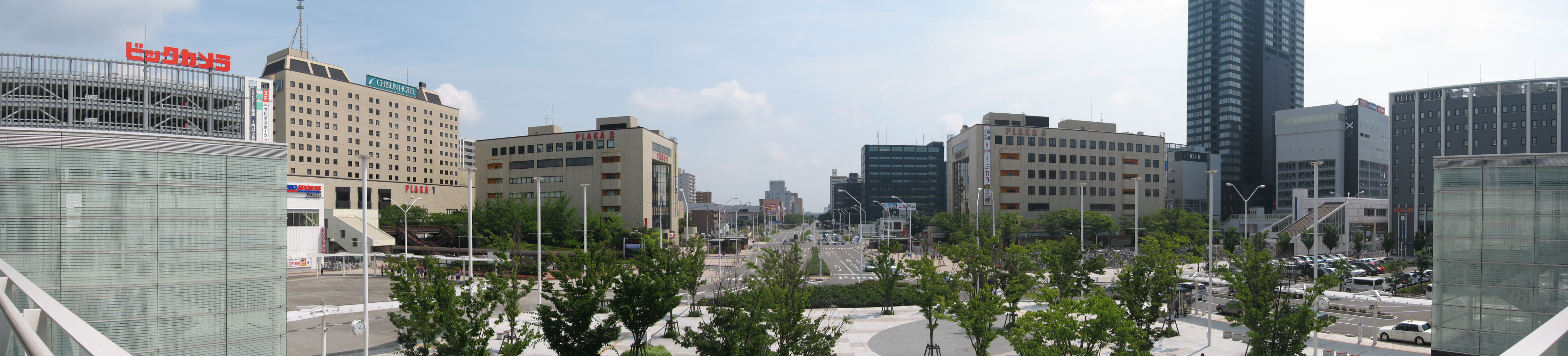 新潟市中央区。新潟駅南地区のパノラマ画像。